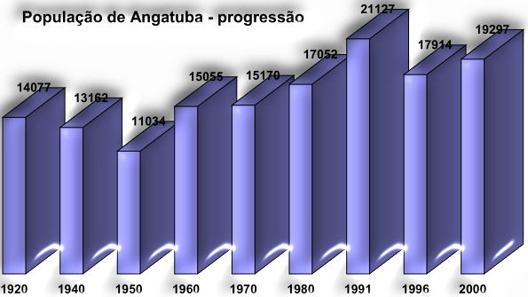 Informação: gráfico da progressão da população de Angatuba (sudoeste do estado de São Paulo - Brasil) desde 1920 Descrição: imagem png Data: 28 de setembro de 2006 Autor: GronkOkara